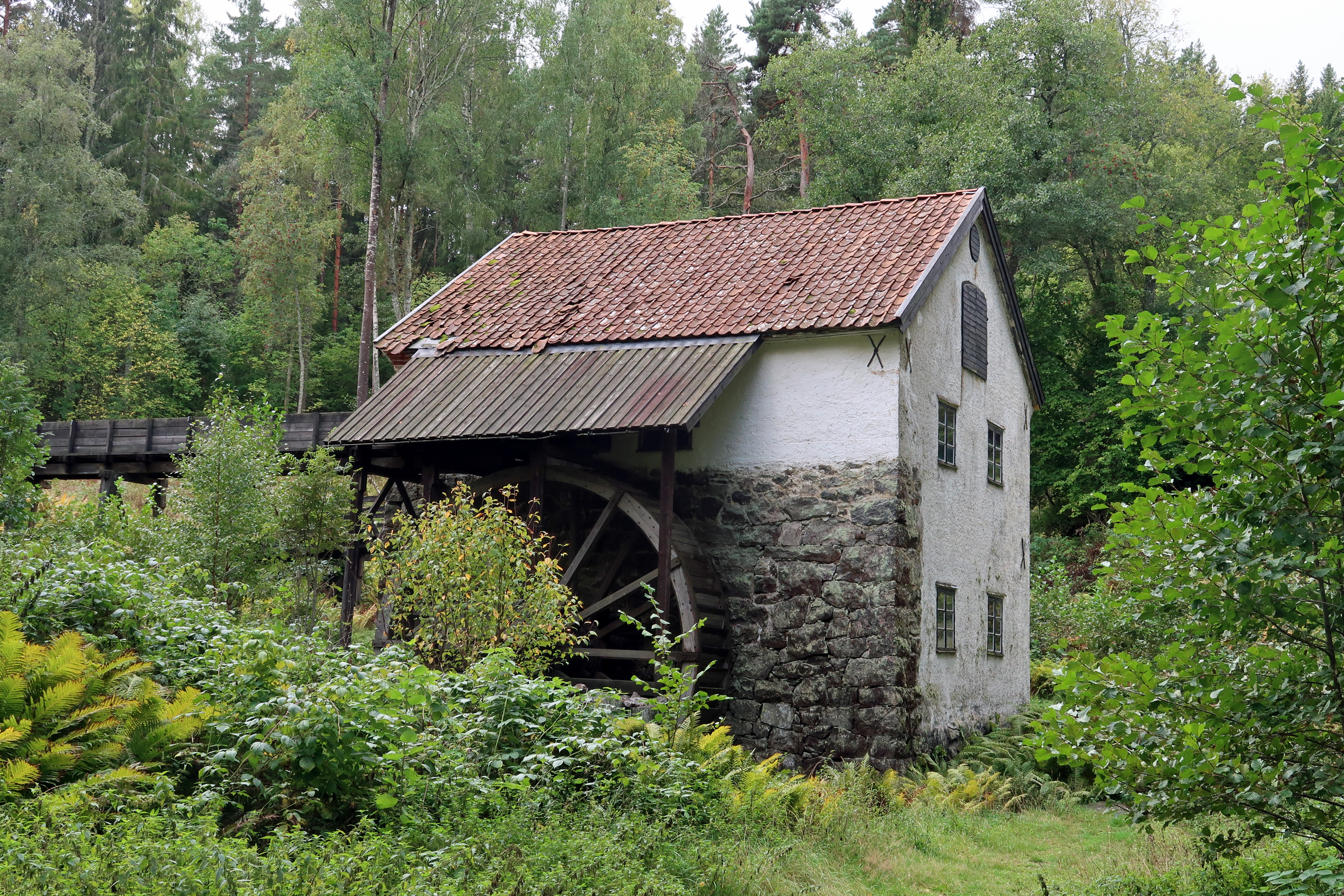 Torpesta kvarn i Ludgo socken, Nyköpings kommun. Kvarnen är uppförd på 1800-talet är en s.k. överfallshjulkvarn. Hjulet är sex meter i diameter.